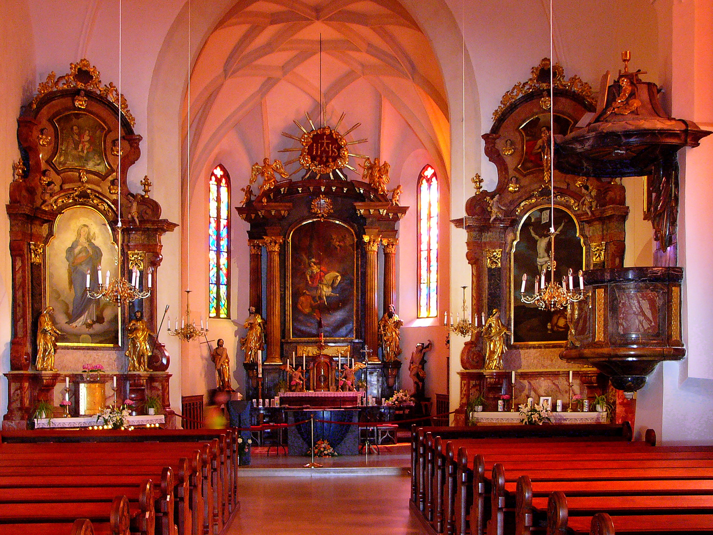 Schiff der Pfarrkirche St. Martin in Riegersburg (Steiermark).